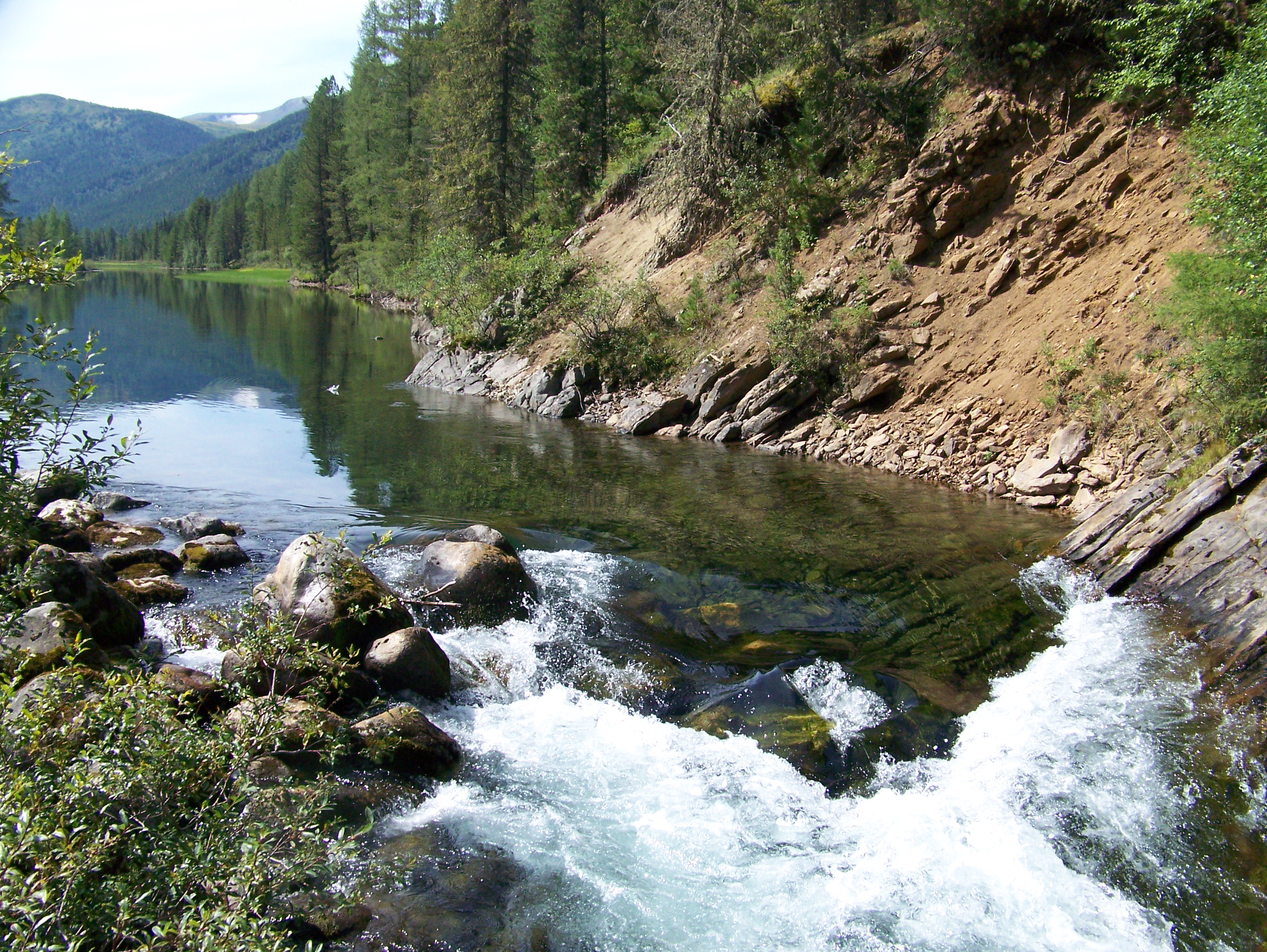 поход на Киторму